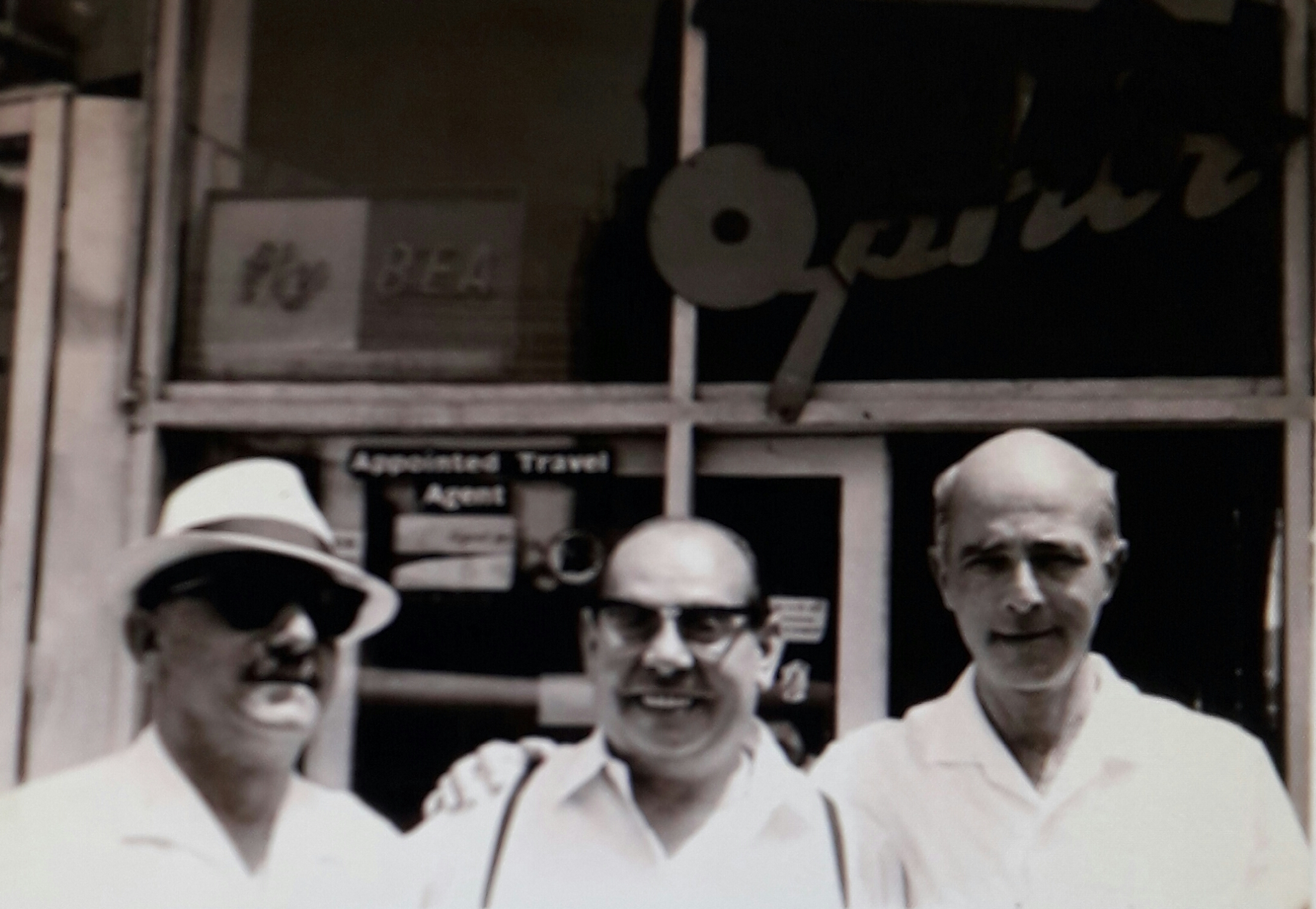 ביקורו של אצ'יו בארץ